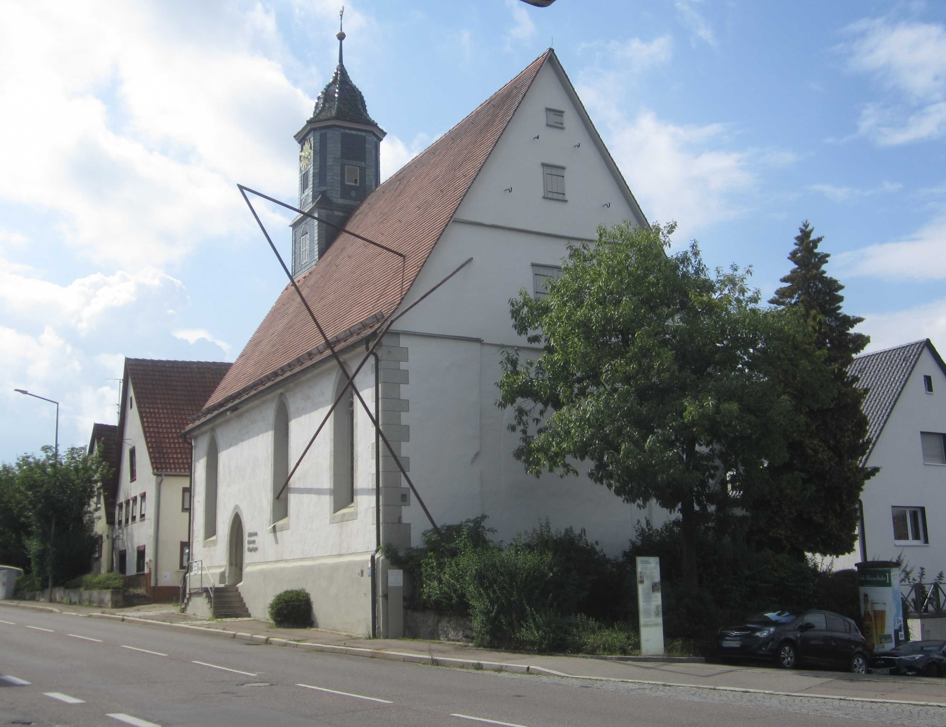 Alte Kirche von Jebenhausen, heute Jüdisches Museum Göppingen, an der Boller Straße